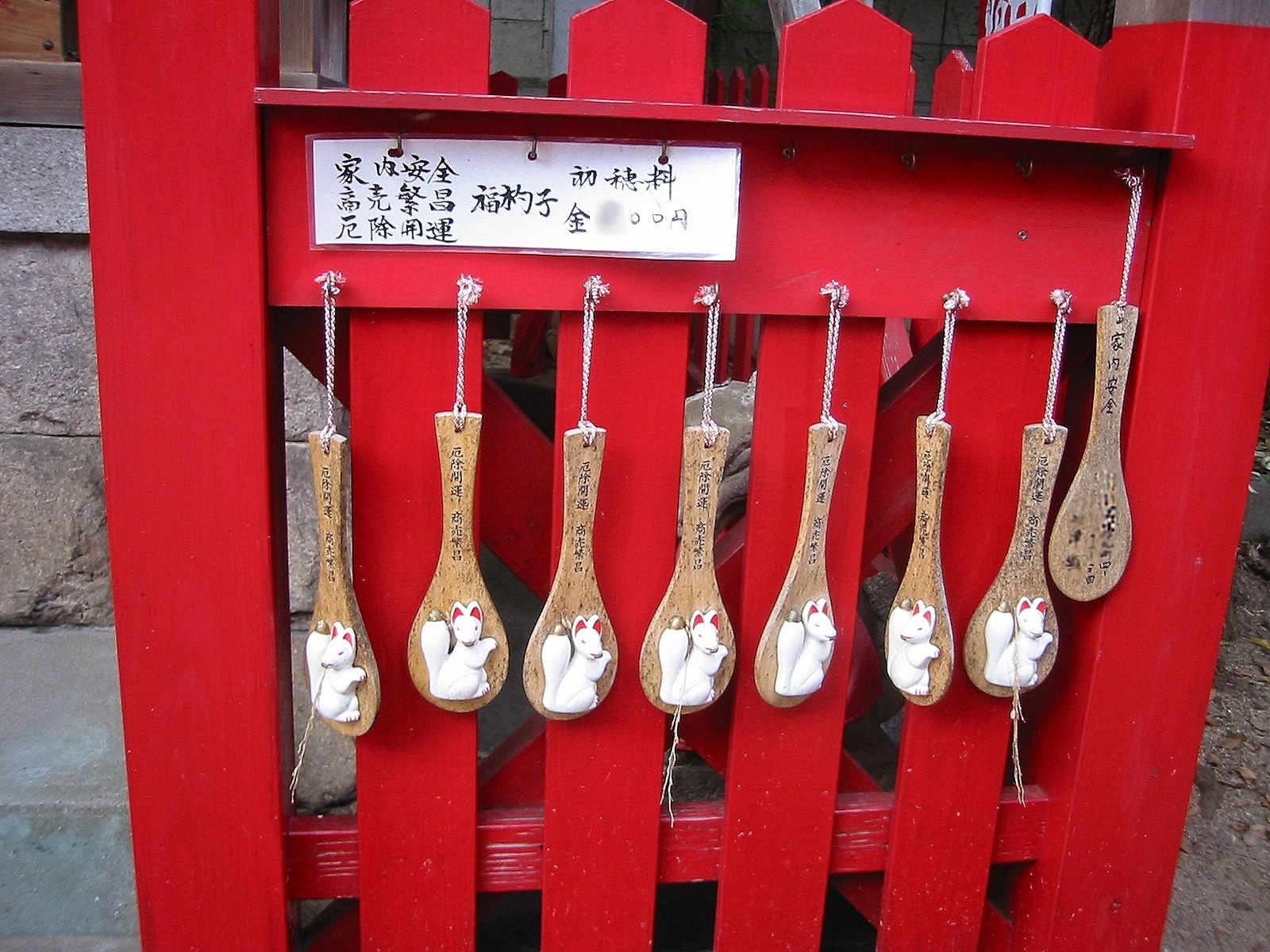 2005-10-23、投稿者自身による撮影、神戸御影の天神さん併設の稲荷神社の福杓子 ©Nnn